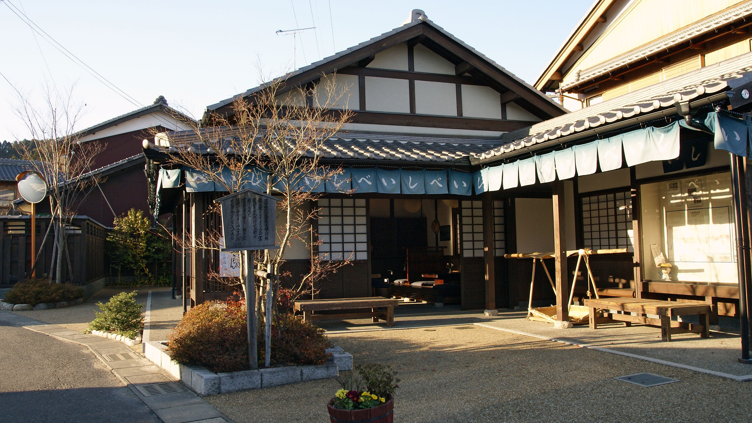 Dengaku-chaya in Konan, Shiga, Japan